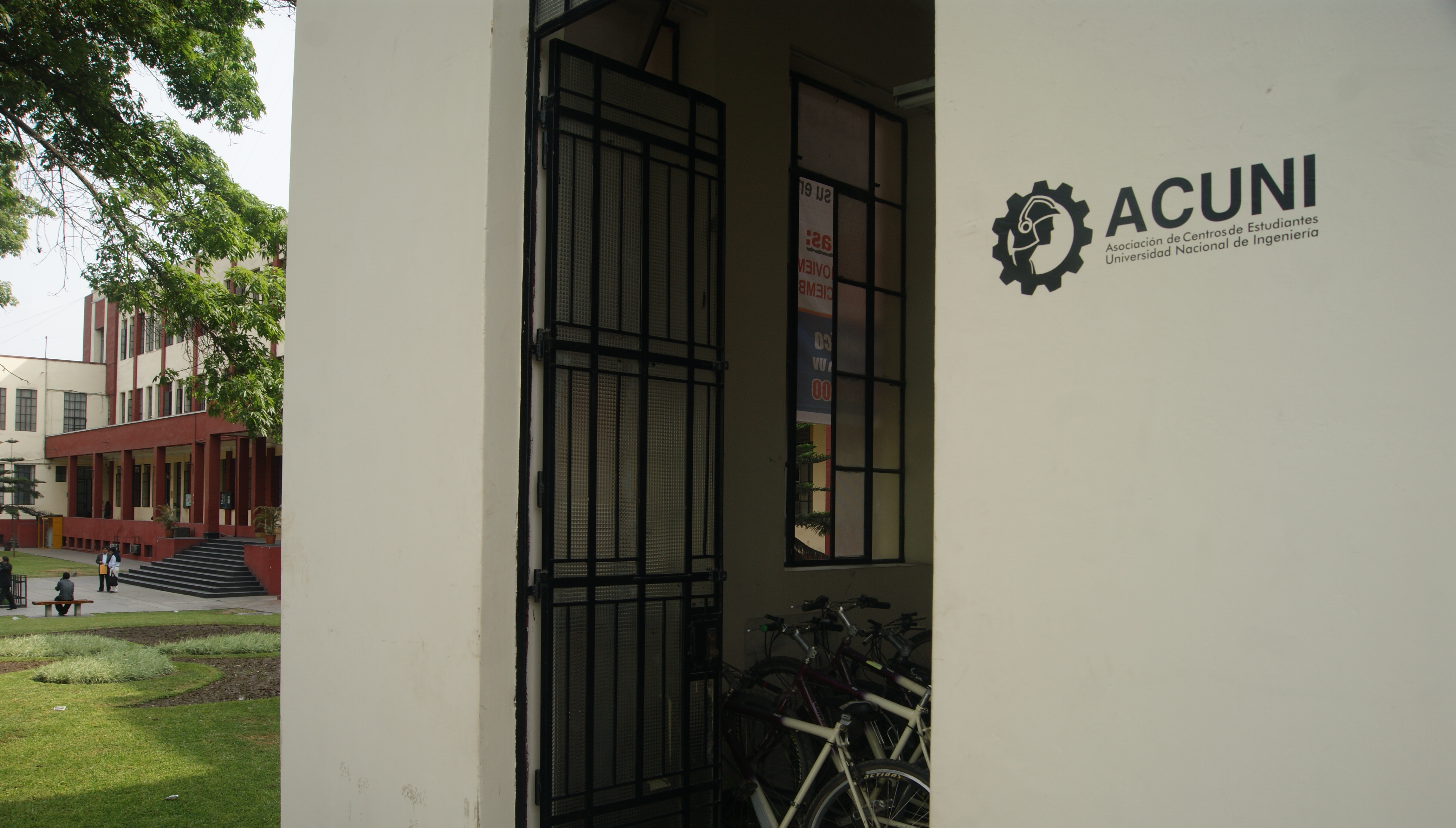 Frontis del local de la Asociación de Centros de Estudiantes de la UNI. Lima, Perú.